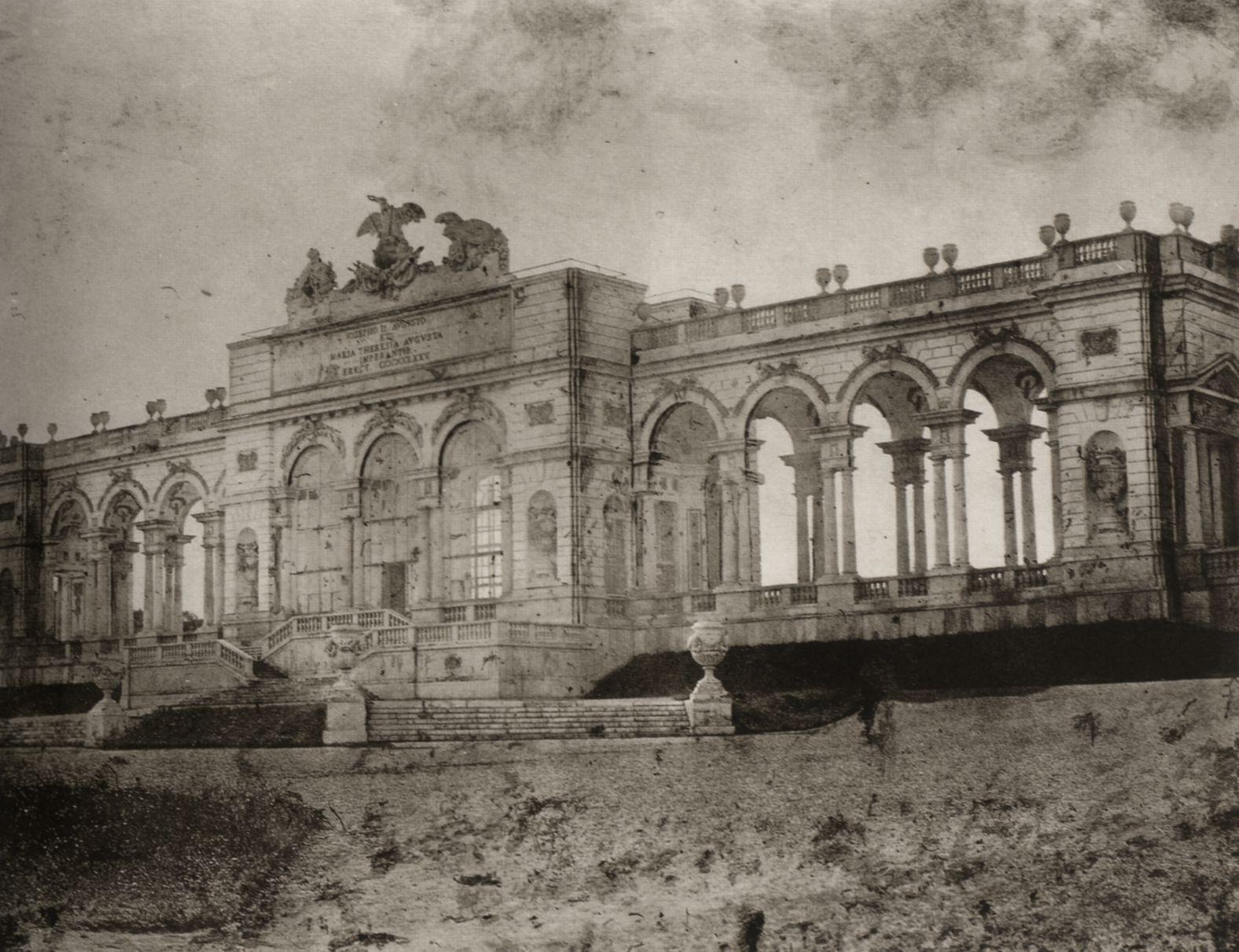 Ansicht der Wiener Gloriette, noch mit der Originalverglasung (Salzpapier, 25,4 x 33,4 cm)